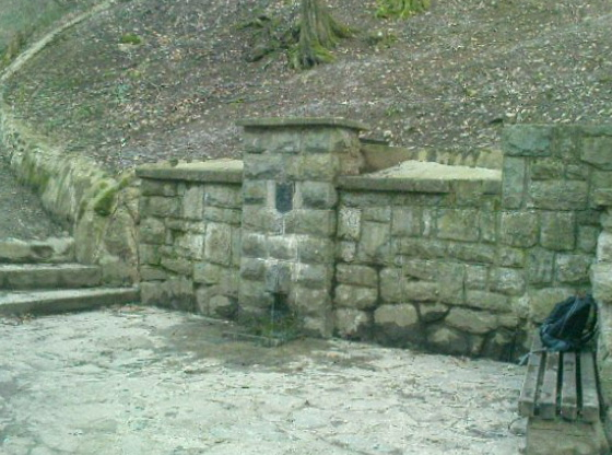 Сакинац, аутор Никола СТОЈАНОВИЋ